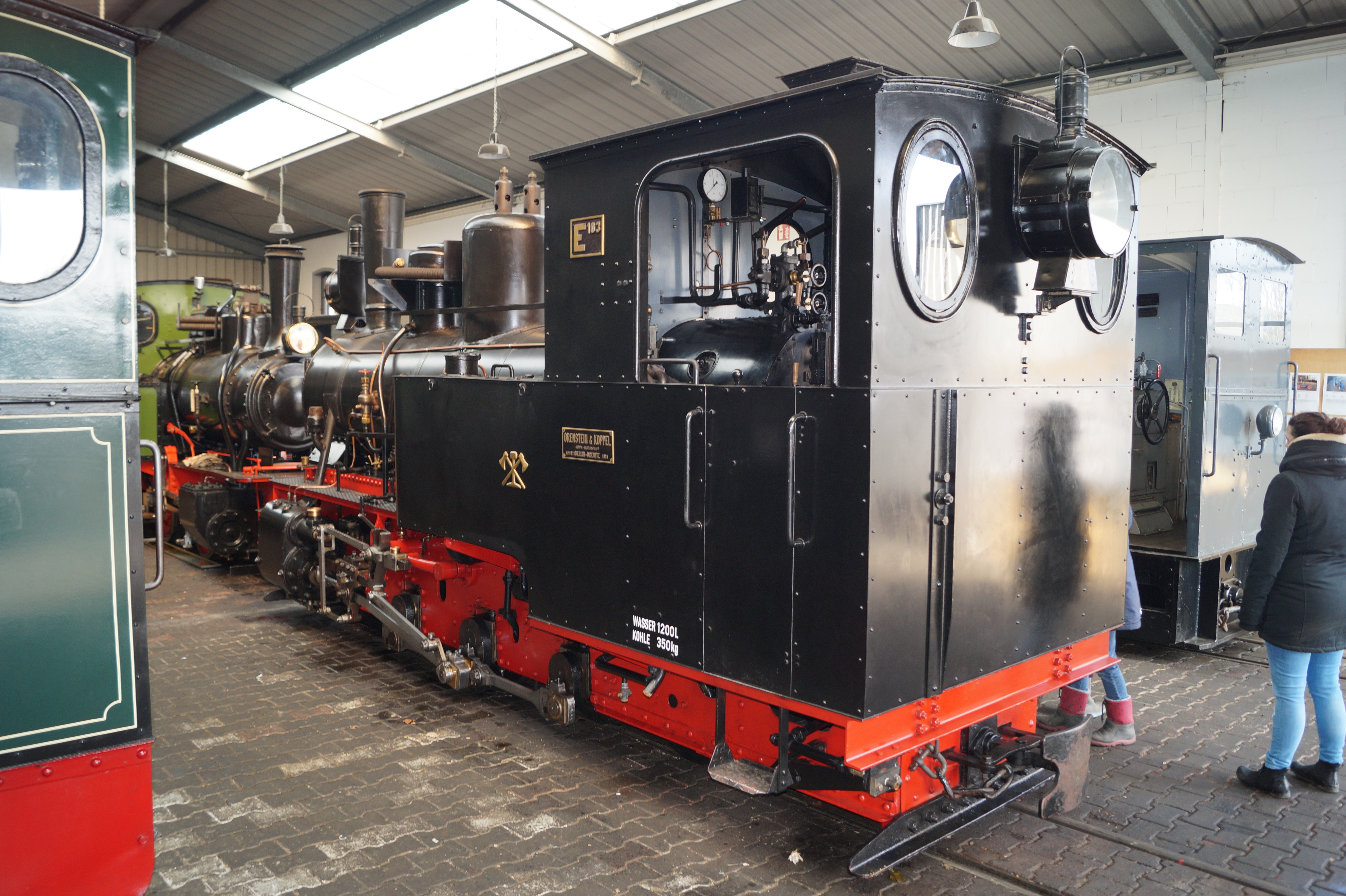 Frankfurter Feldbahnmuseum 2018